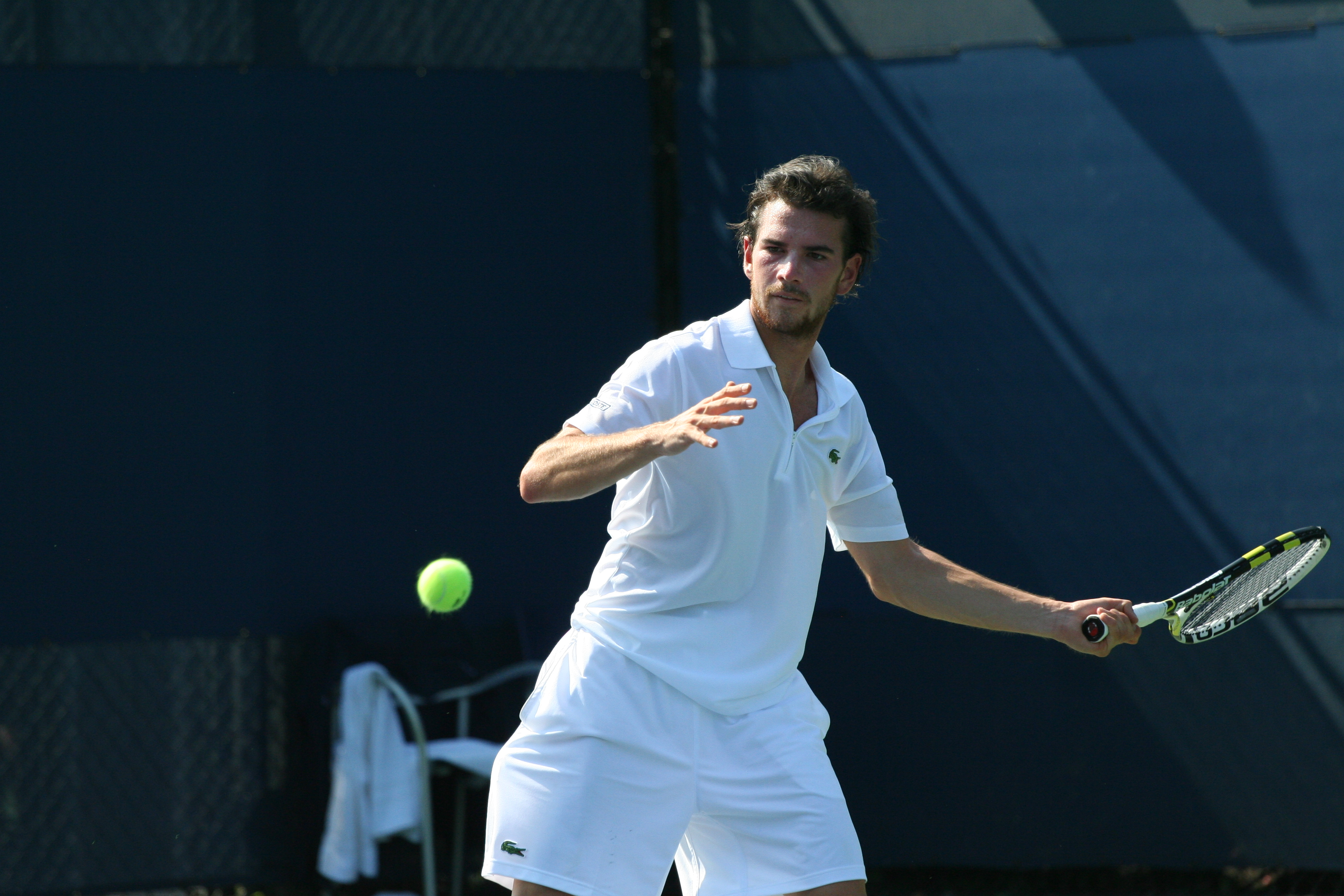 U.S. Open Aug. 31, 2010